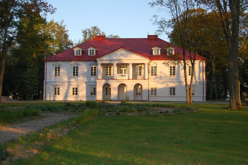 Bistrampolio dvaras Kučiai